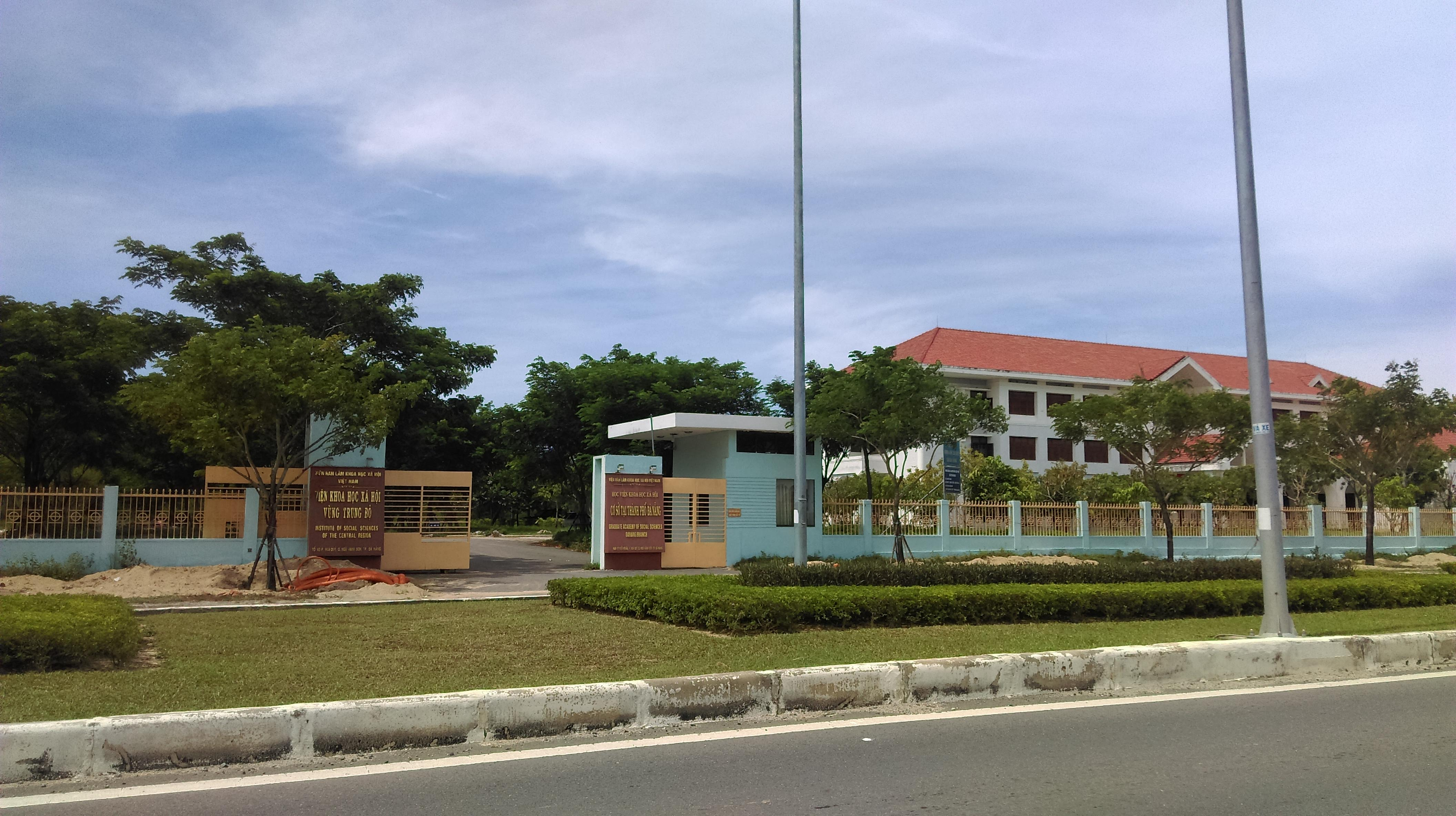 Học viện Khoa học Xã hội cơ sở tại Đà Nẵng